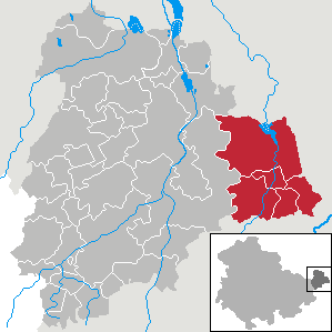 Verwaltungsgemeinschaft Wieratal in Thuringia - District Altenburger Land